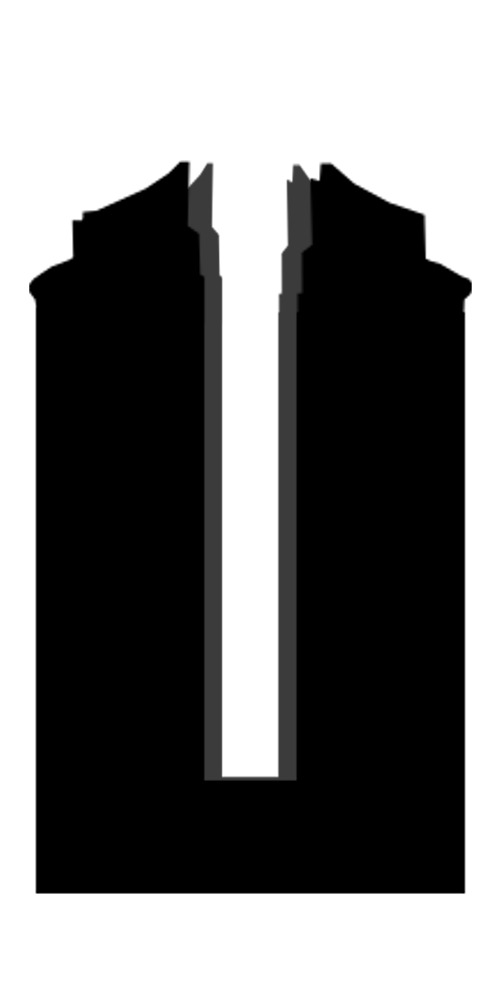 Diseño del DAMAC Towers by Paramount